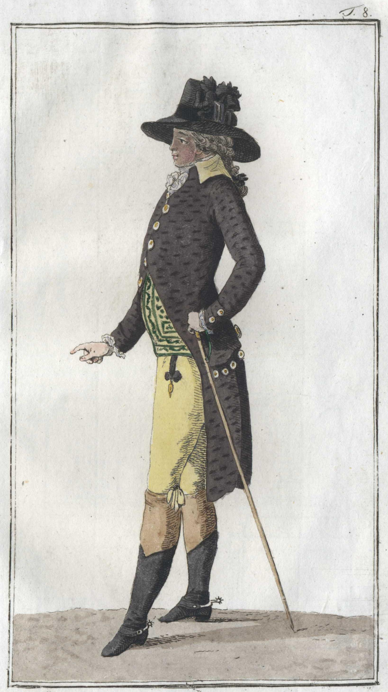 französisches Negligée aus dem Jahre 1787